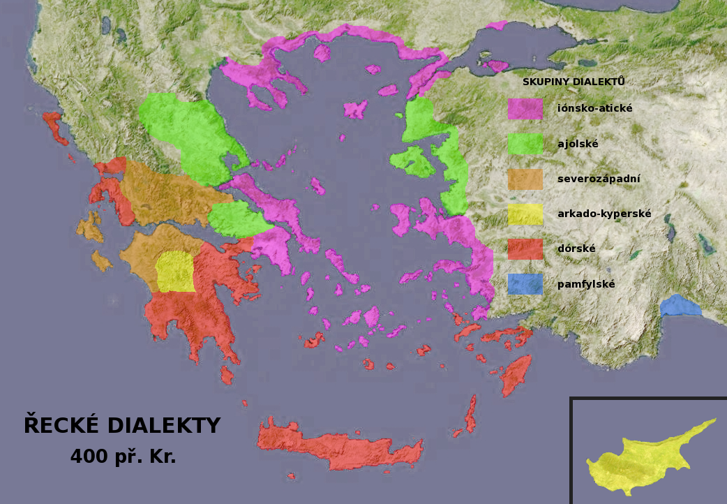 Rozmístění starořeckých dialektů. Podle mapy Distribution of Greek dialects.